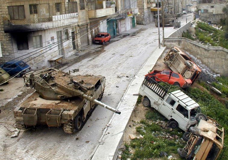 קרב ג'נין בחומת מגן